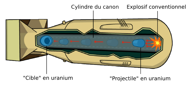 Schéma de la bombe atomique Little Boy (Hiroshima). Adapté depuis la version anglaise. This is not, of course, a technically accurate portrayal of the Little Boy weapon that was dropped on Hiroshima -- many aesthetic liberties have been taken for the purpose of explaining the gun-type concept (for example, as far as is known, the bullet fired from the rear of the device to the target in the front of the device, but if had been drawn that way, you could not see the hole in the target into which the bullet would fit). The purpose of this diagram is to explain the concept and still ground it in a real technological object; an attempt to have the benefits of abstraction without the detriment of forgetting that these are real objects. -- User:Fastfission